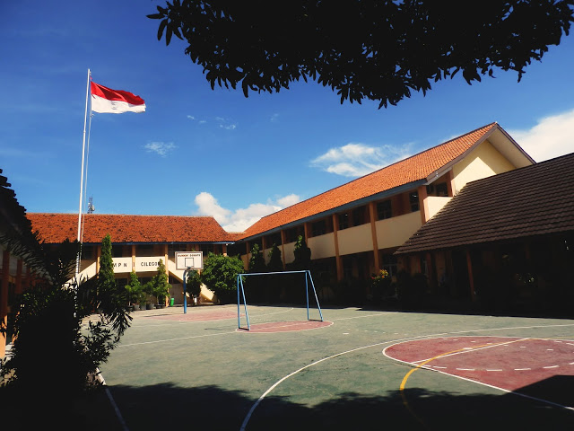 Bangunan Sekolah Menengah Pertama Negeri 1 TIGALIngga